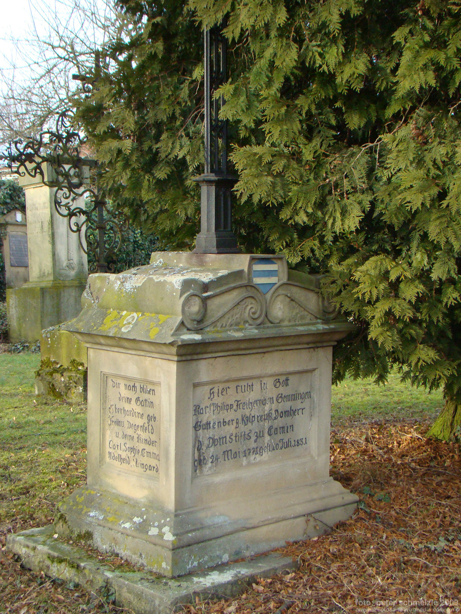 Grabmal für Freiherr Karl Philipp von Gemmingen-Guttenberg (1771-1831) auf dem Friedhof in Bad Rappenau-Bonfeld